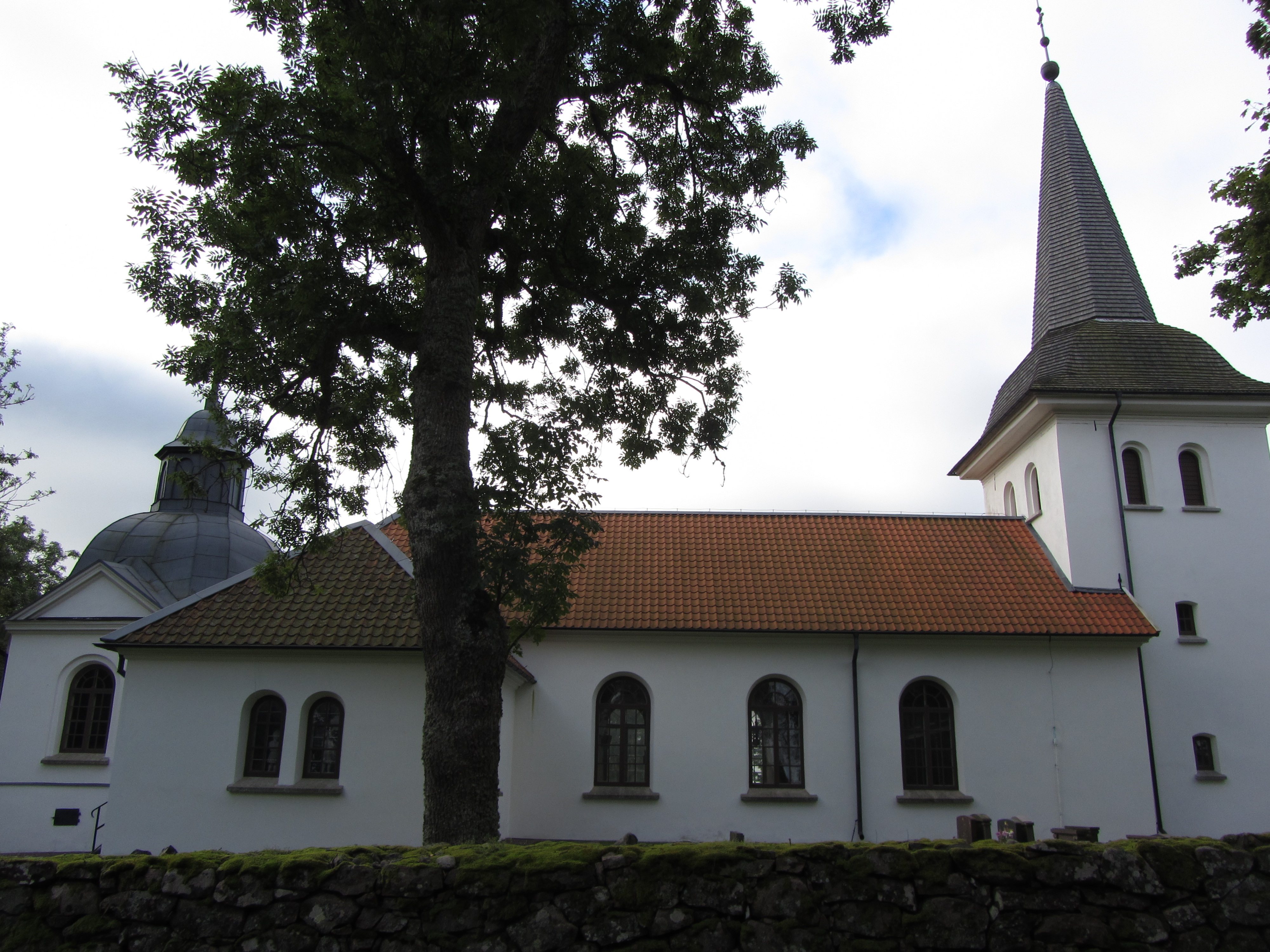 Berga kyrka i Västergötland, öster om Mariestad.